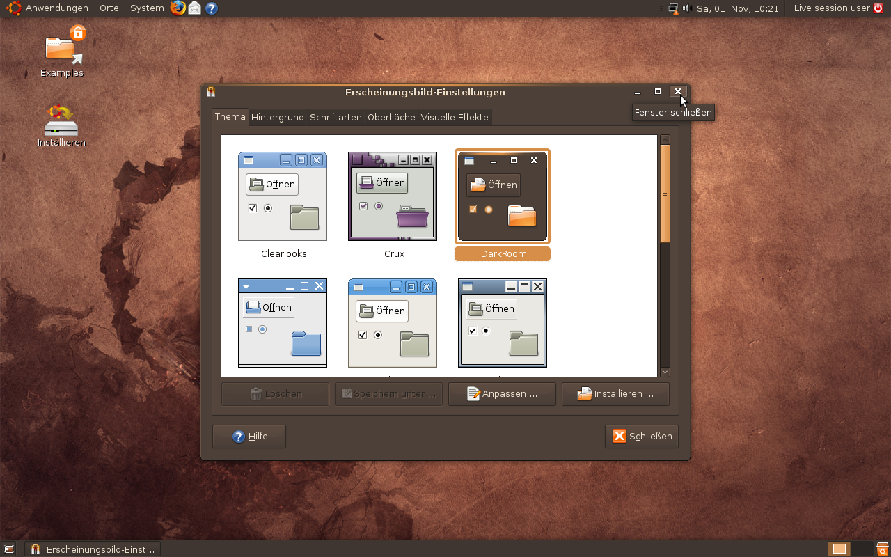 Bildschirmphoto von Ubuntu 8.10 »Intrepid Ibex« mit deutscher Benutzeroberfläche und dem »DarkRoom«-Thema